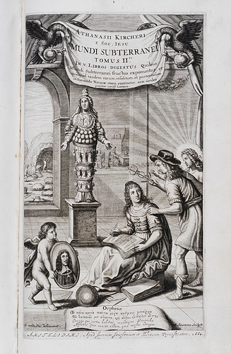 Frontispice du tome 2 du "Mondus subterraneus" d'Athanasius Kircher montrant une statue d'Isis-Artémis-Nature